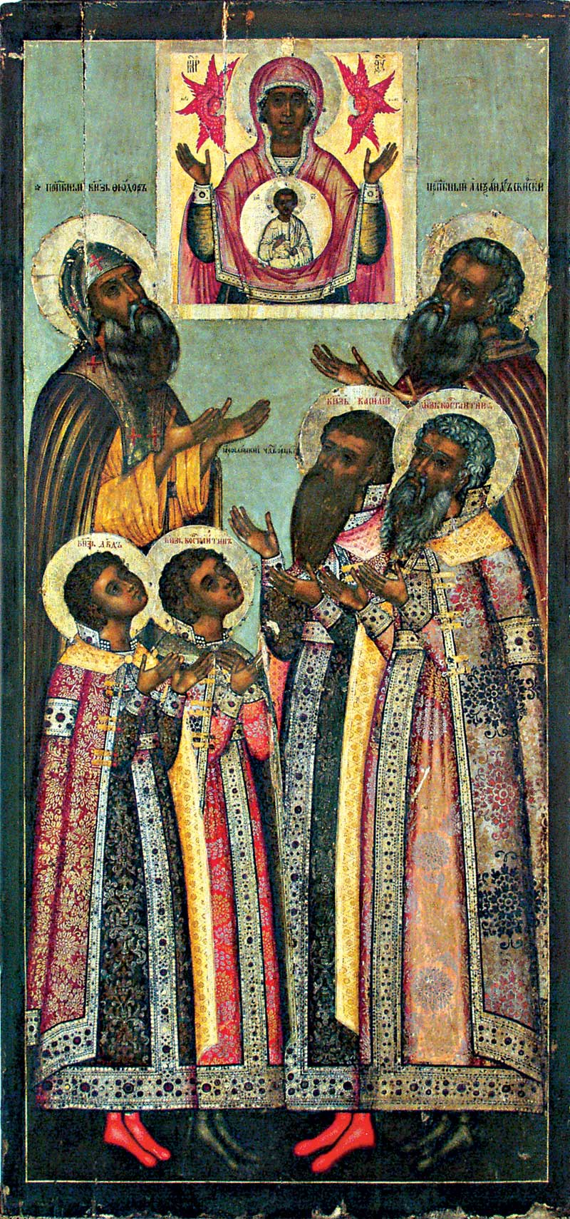 Избранные святые в молении перед иконой Богоматери Знамение (ярославские чудотворцы князья Феодор, Давид, Константин, Василий и Константин, и преподобный Александр Свирский). 110.8 × 52 см. Ярославский художественный музей, Ярославль, Россия